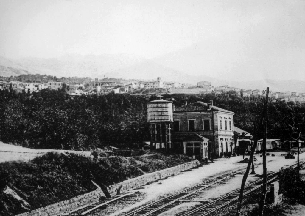 Bivona - Stazione e panorama